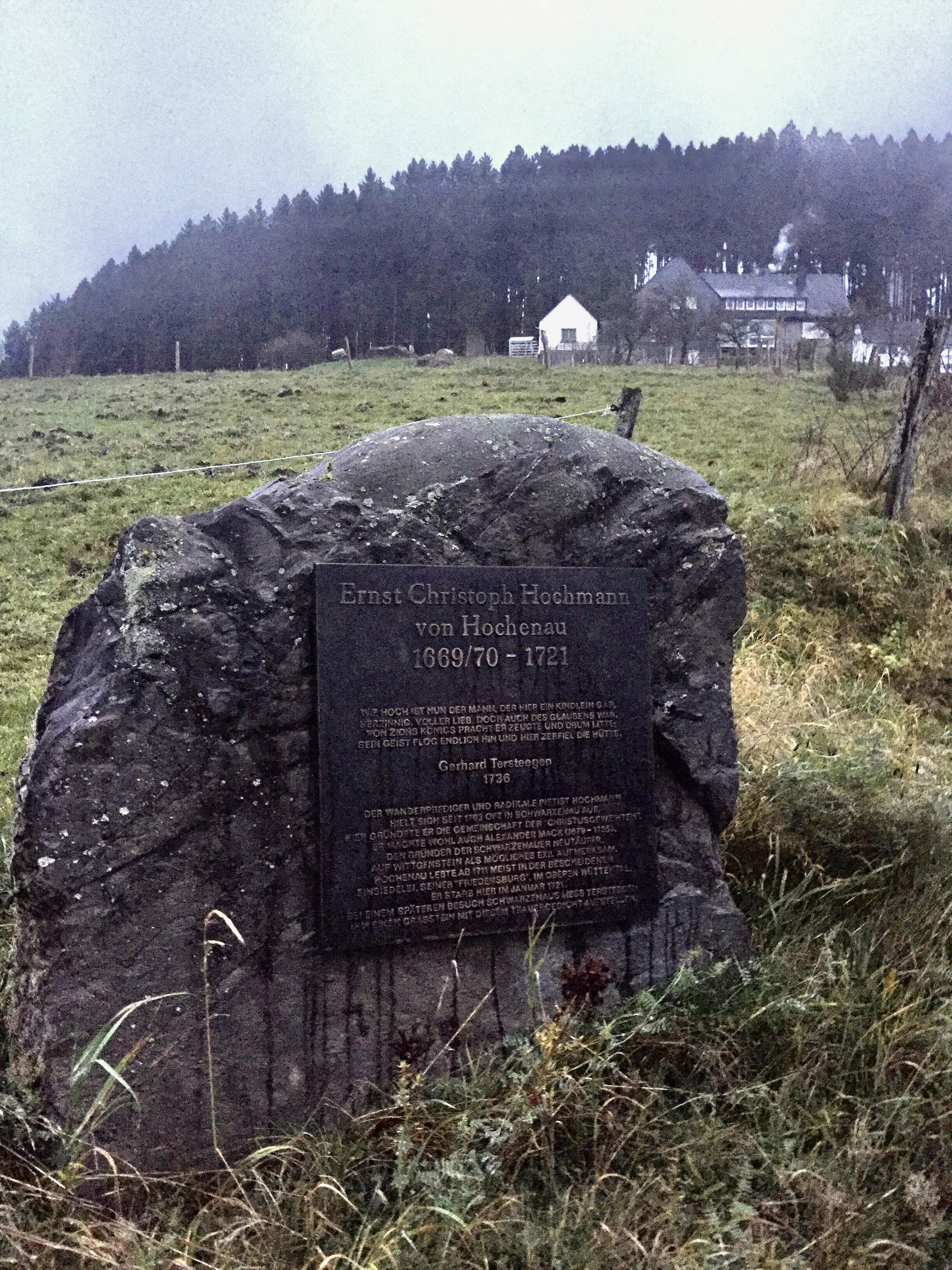 Das Foto zeigt den Gedenkstein für Ernst Christoph Hochmann von Hochenau in Schwarzenau bei Bad Berleburg gegenüber der mutmaßlichen Stätte seiner "Friedensburg".